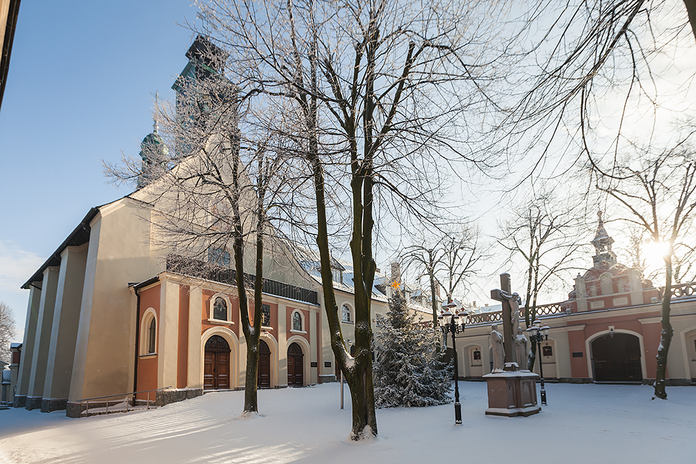 Na zdjęciu widoczna cześć Rajskiego Placu z krzyżem oraz wejściem głównym do bazyliki św. Anny